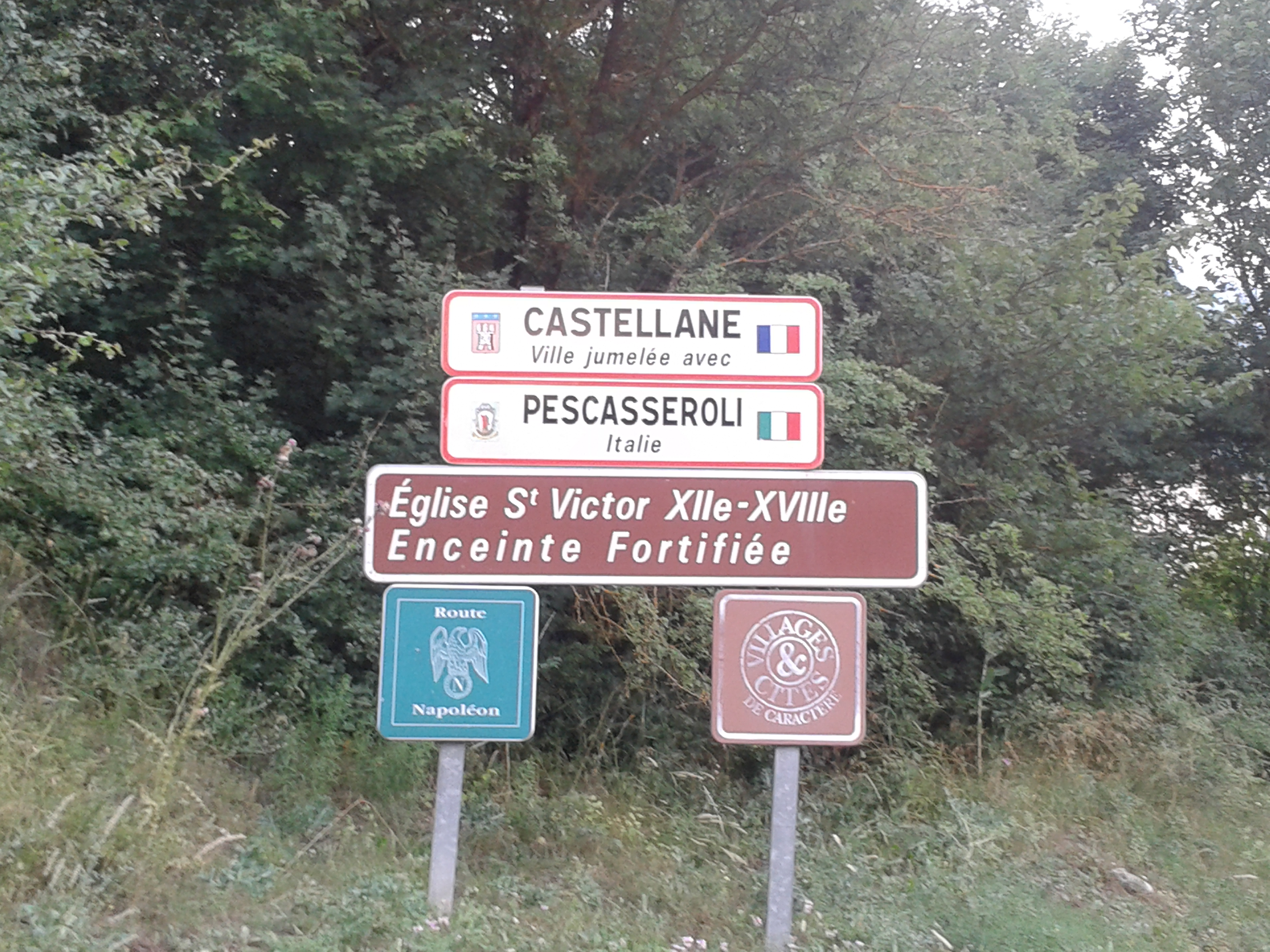 Panneau annonçant l'entrée dans la commune de Castellane (Provence-Alpes-Côte d'Azur).